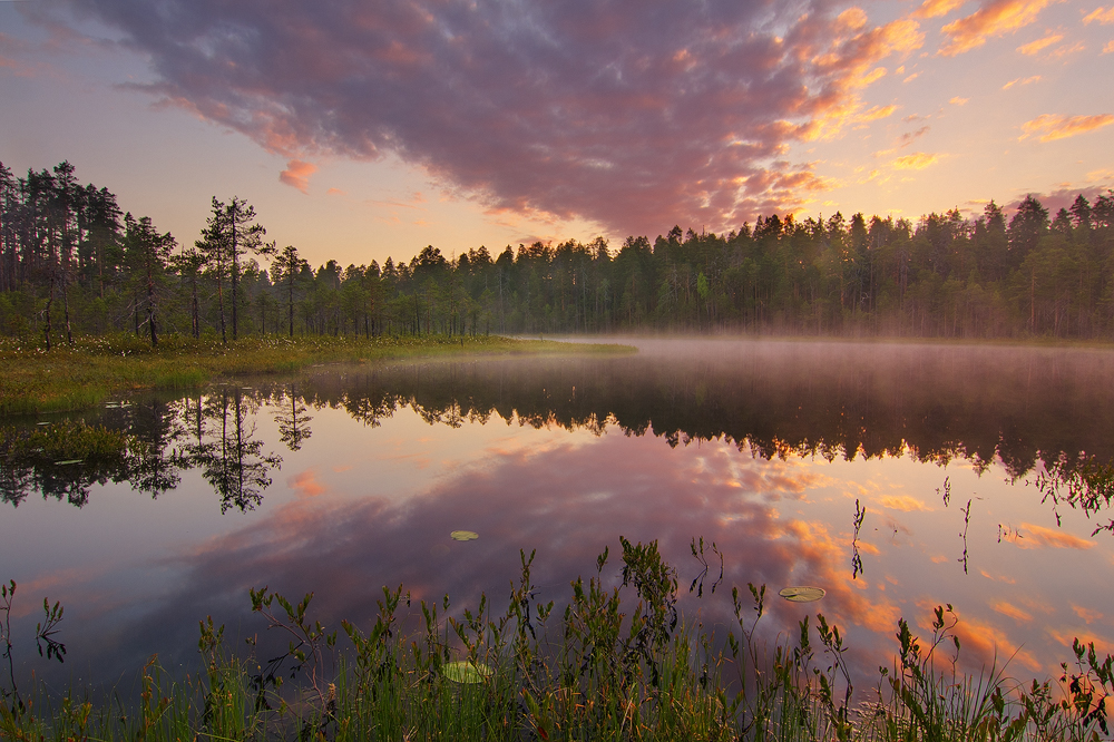 Заповедник «Кивач», Кондопожский район This image is related to the protected area of Russia number 1000032